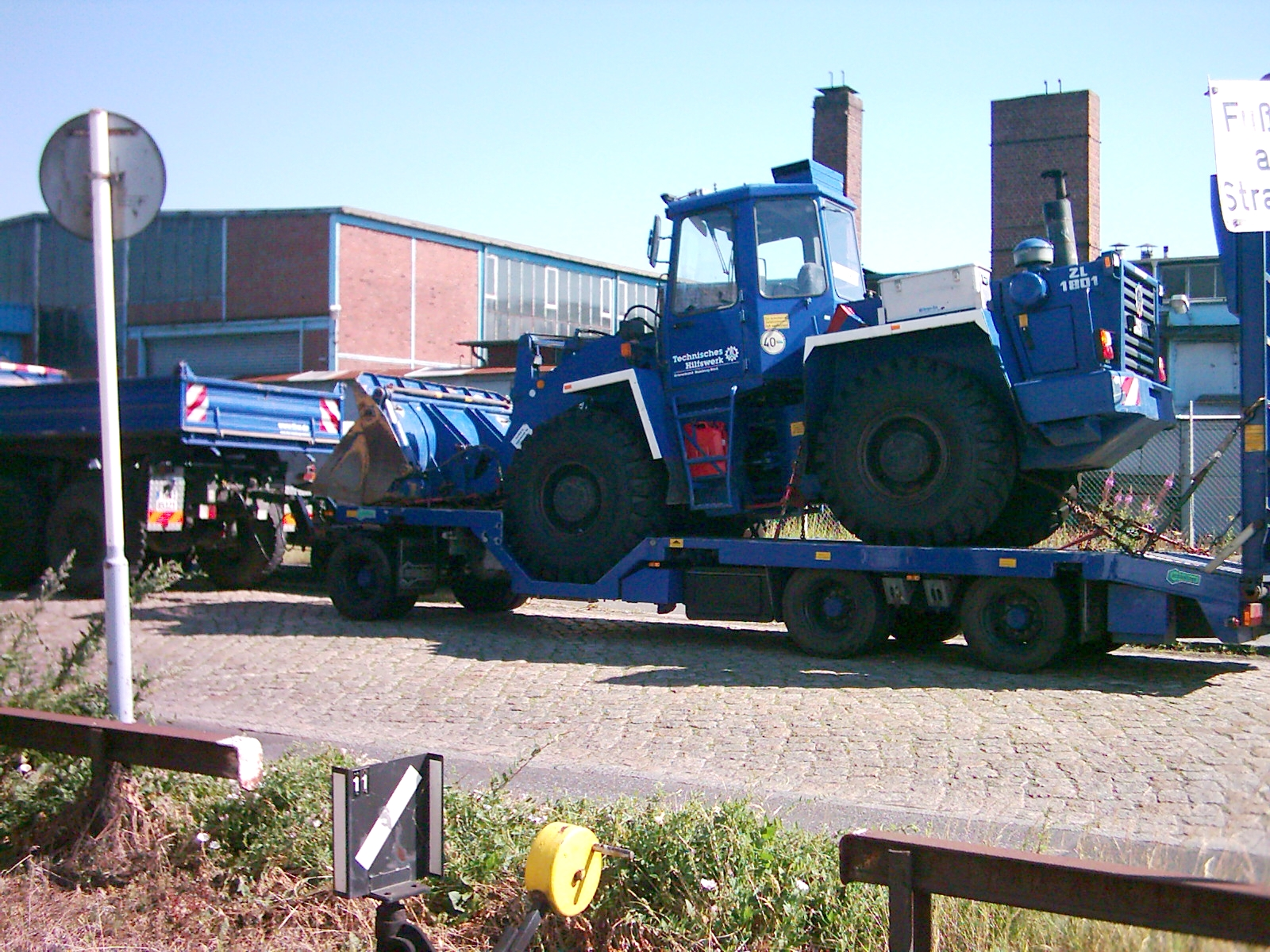 THW-Fahrzeuge in Hamburg